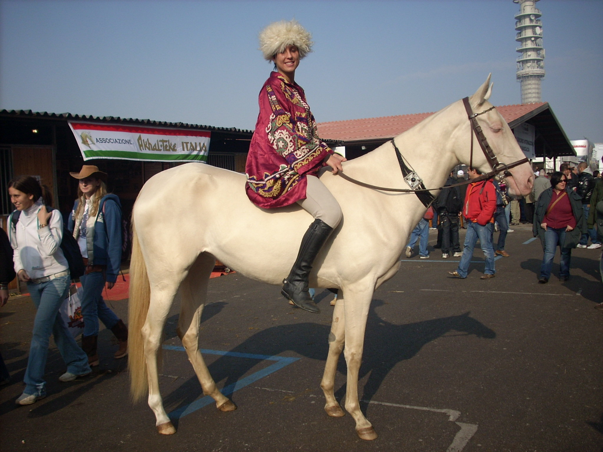 An Akhal-Teke at Verona Fieracavalli, 2007 - KEBELEK femmina del 2005 linea Gelishikli da Muzar e Annai Shael nata in Italia , allevamento Prati Nuovi di Travagliato ( Brescia) di Mino e Alessandra Denti